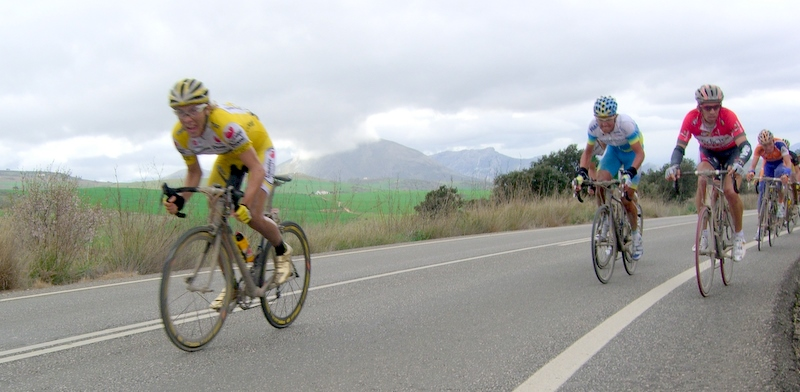 2007 Vuelta a Andaluca/Ruta del Sol